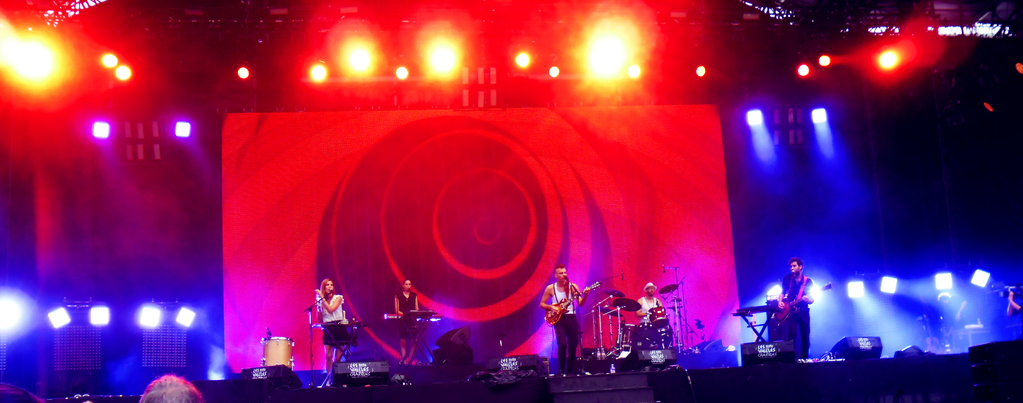 Asaf Avidan à Carhaix en 2013